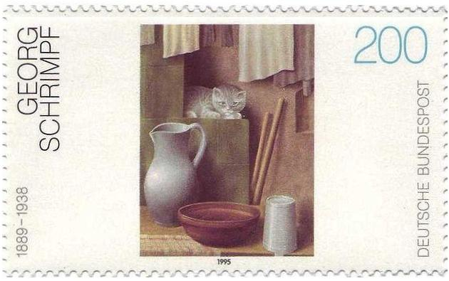 Sonderbriefmarke zu Ehren des Malers Georg Schrimpf. "Stilleben mit Katze", 1923 (Staatsgalerie moderner Kunst, München).